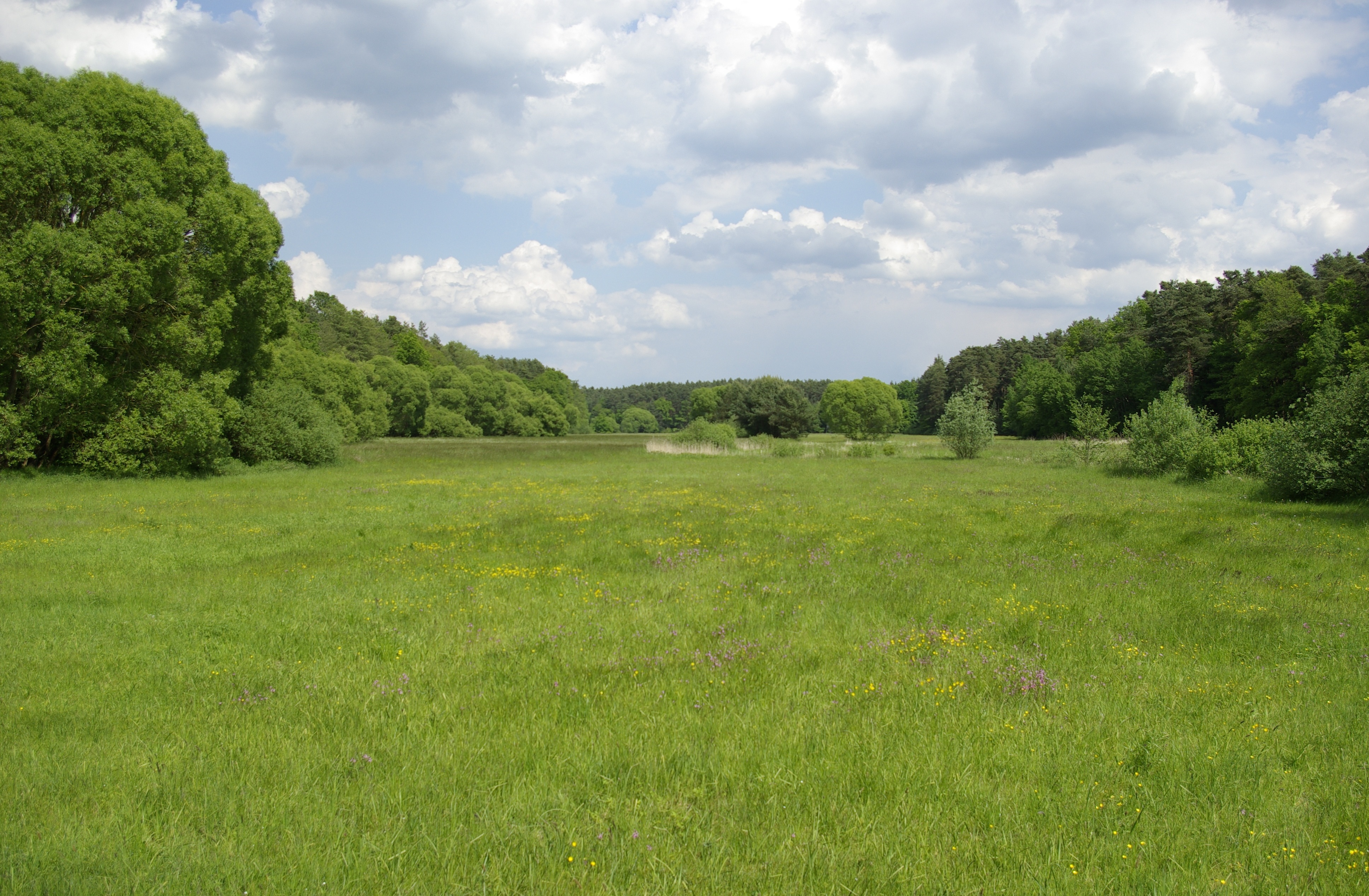 Der Seebachgrund südlich des Waldgebietes Dechsendorfer Lohe im Erlanger Stadtteil Dechsendorf.